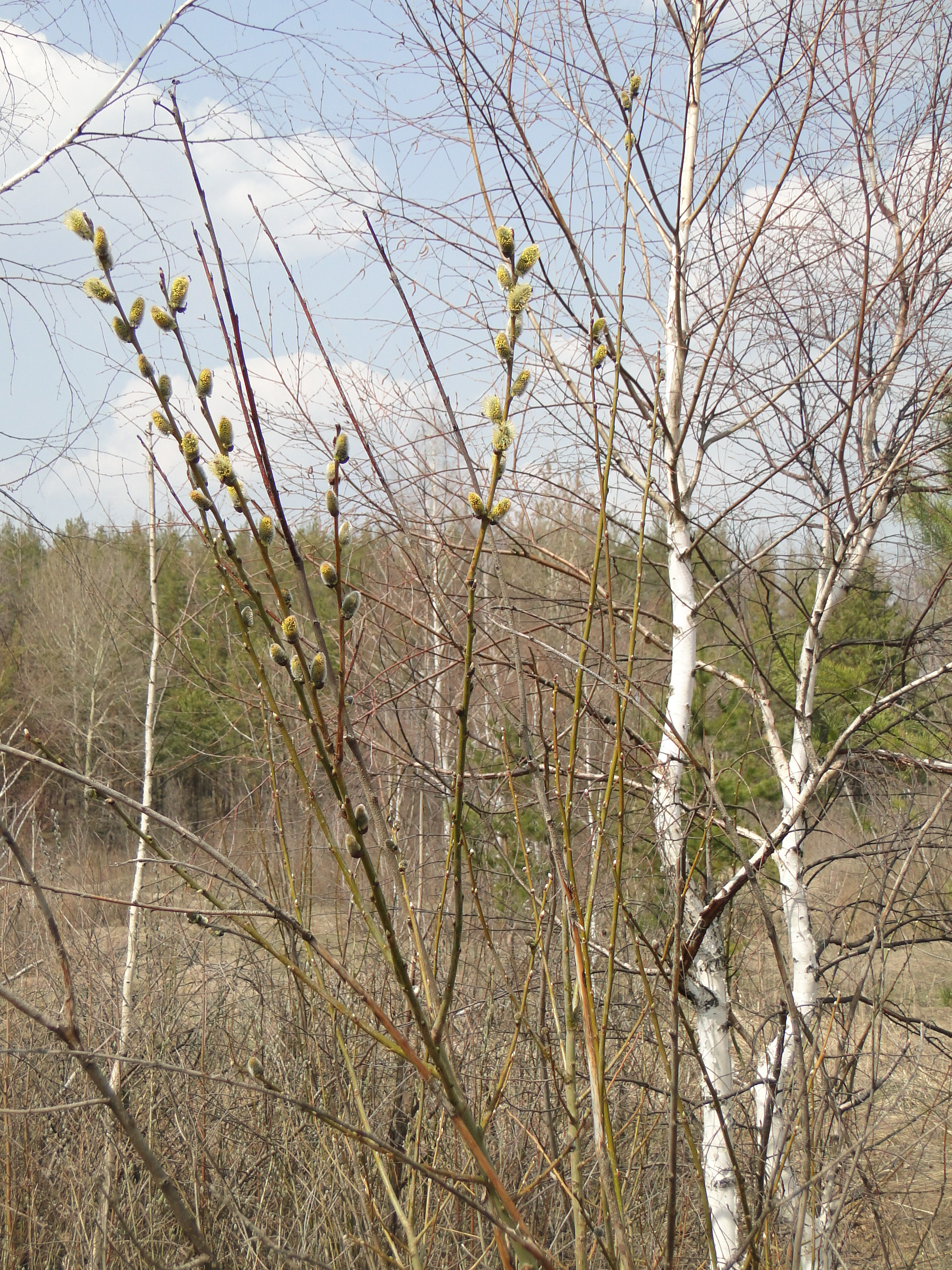 Апрель